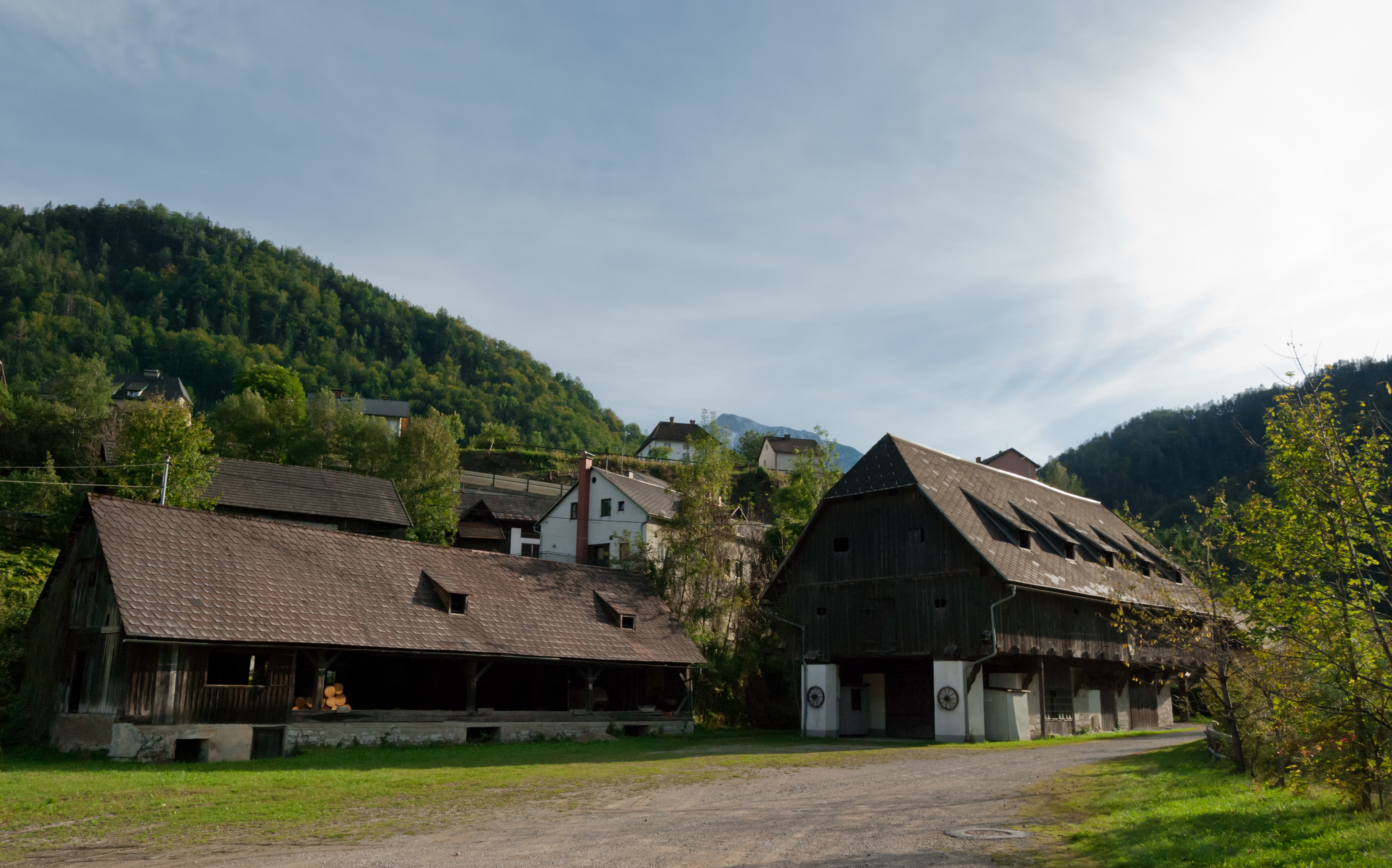 Kohlwaage